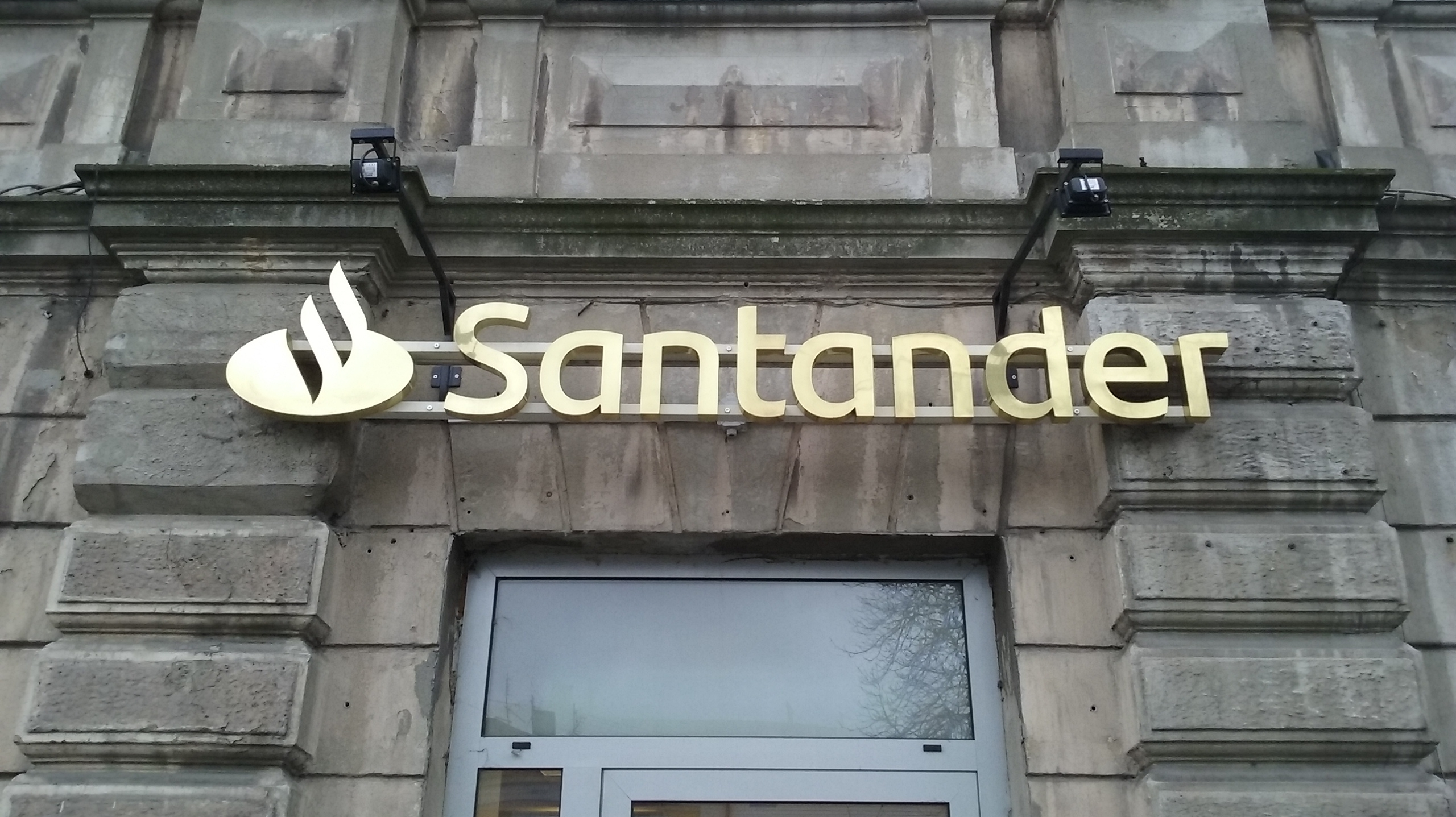 Logo santander na dawnym oddziale banku BZ WBK w Tomaszowie Mazowieckim, w województwie łódzkim